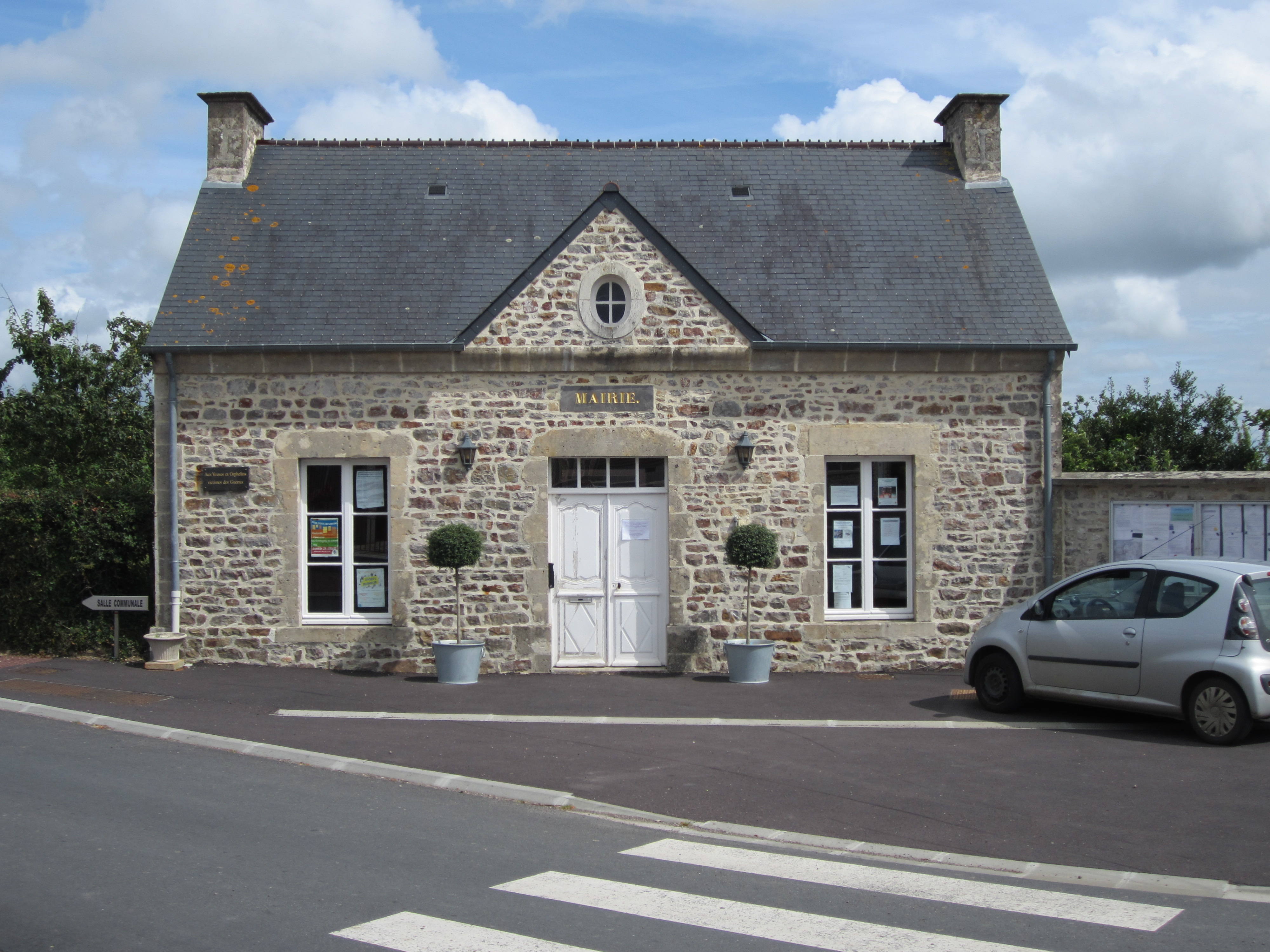 Église Saint-Laurent de